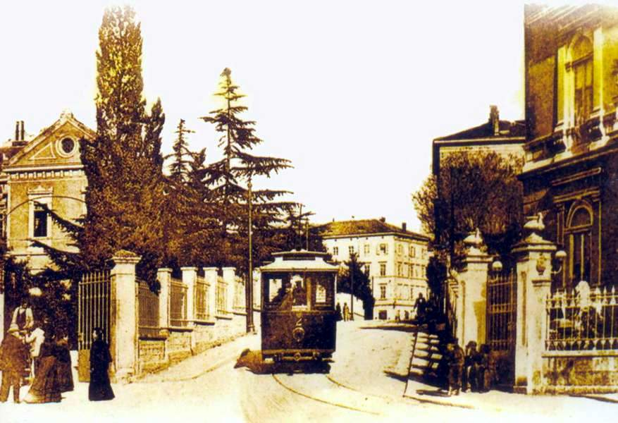 Pula, pre WWI postcard.